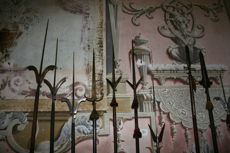 Serie di armi in asta, XVI-XVII sec., Palazzo Duranti-Marzoli, Palazzolo sull'Oglio.